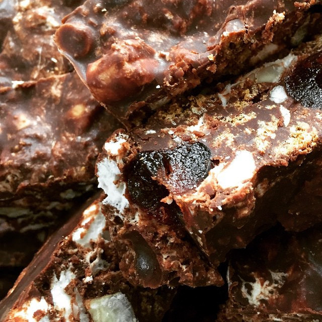 via Instagram bit.ly/1zeQx6j